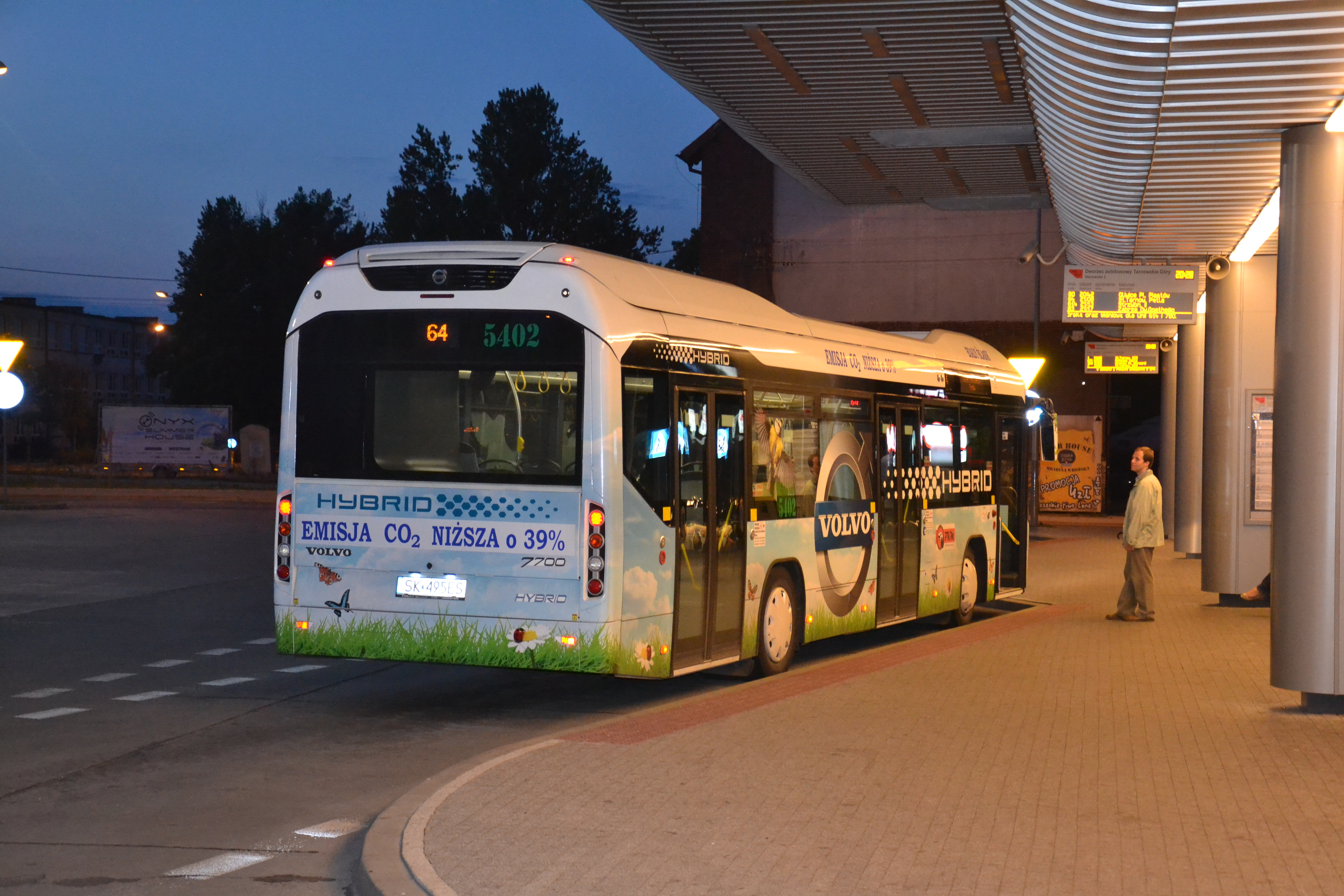 Hybrydowy autobus Volvo w Tarnowskich Górach